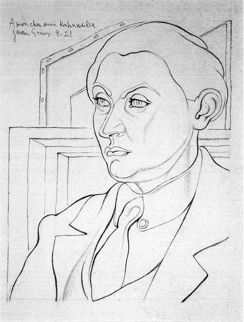 Juan Gris: Porträt Daniel-Henry Kahnweiler, 32,5 x 26 cm, Bleistift auf Papier, Musée National d'Art Moderne, Centre Georges Pompidou, Paris